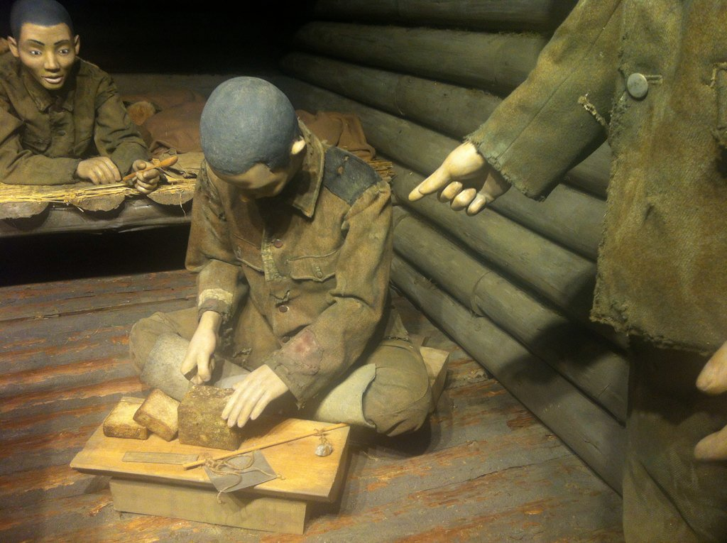 ジオラマ ラーゲリ(収容所)の食事